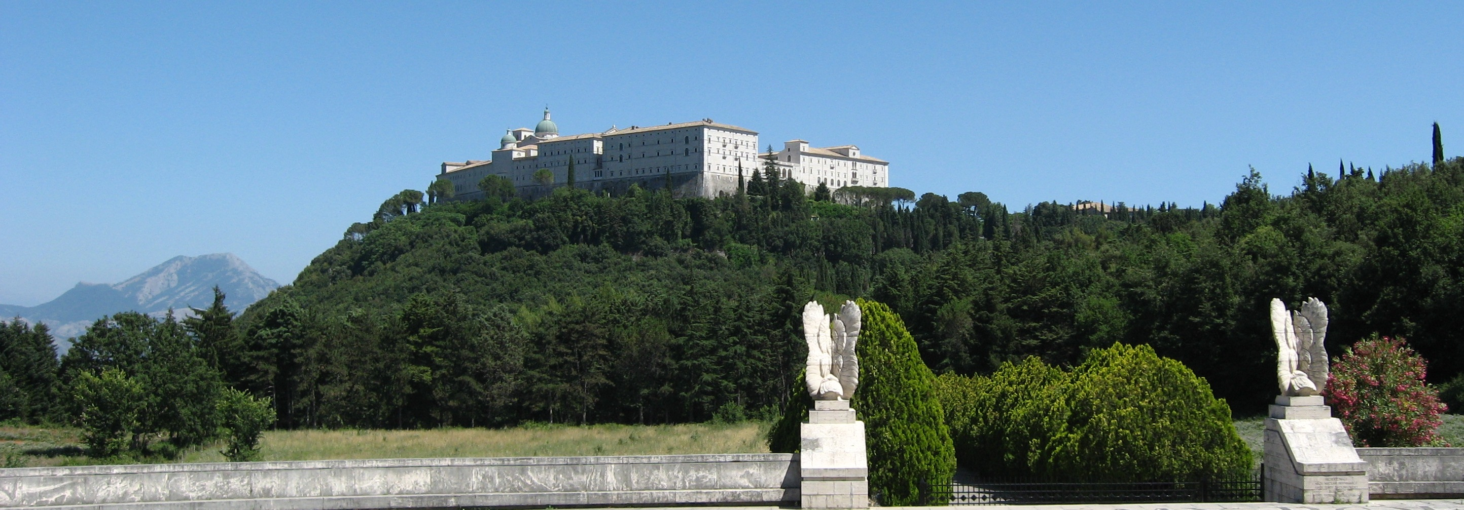 Monte Cassino Abbey